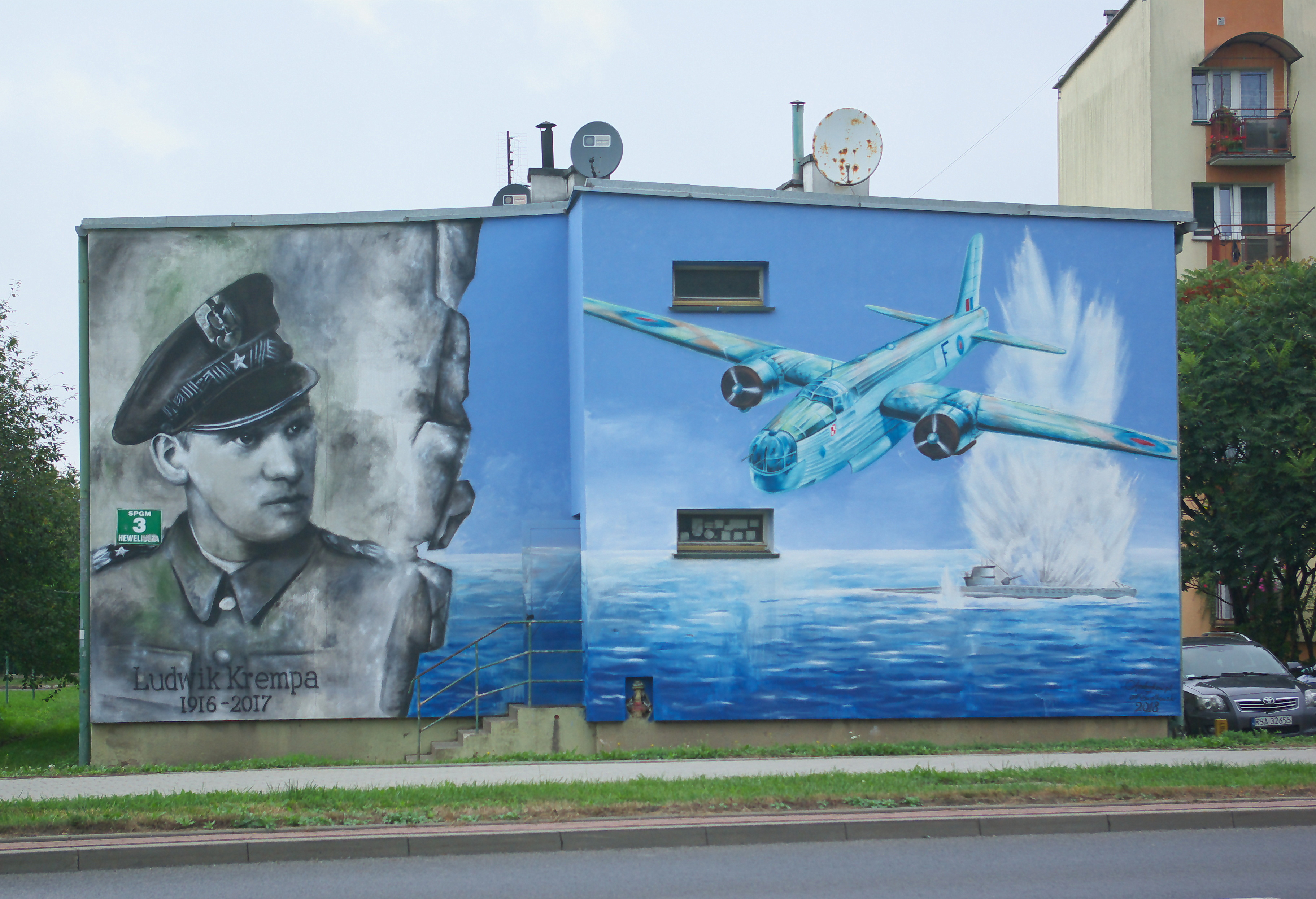 Mural przedstawiający Ludwika Krempę i samolot Wellington, wykonany na ścianie budynku mieszkalnego przy ul. Jana Heweliusza 3 w Sanoku. Autorzy obrazu: Arkadiusz Andrejkow i Marek Szatkowski.